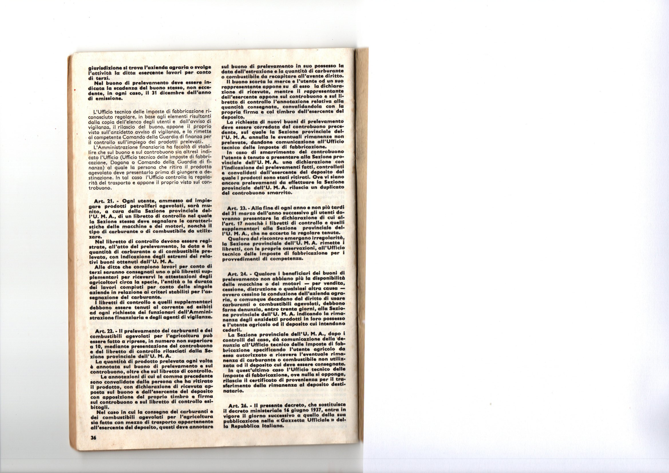 regolamento uma 3